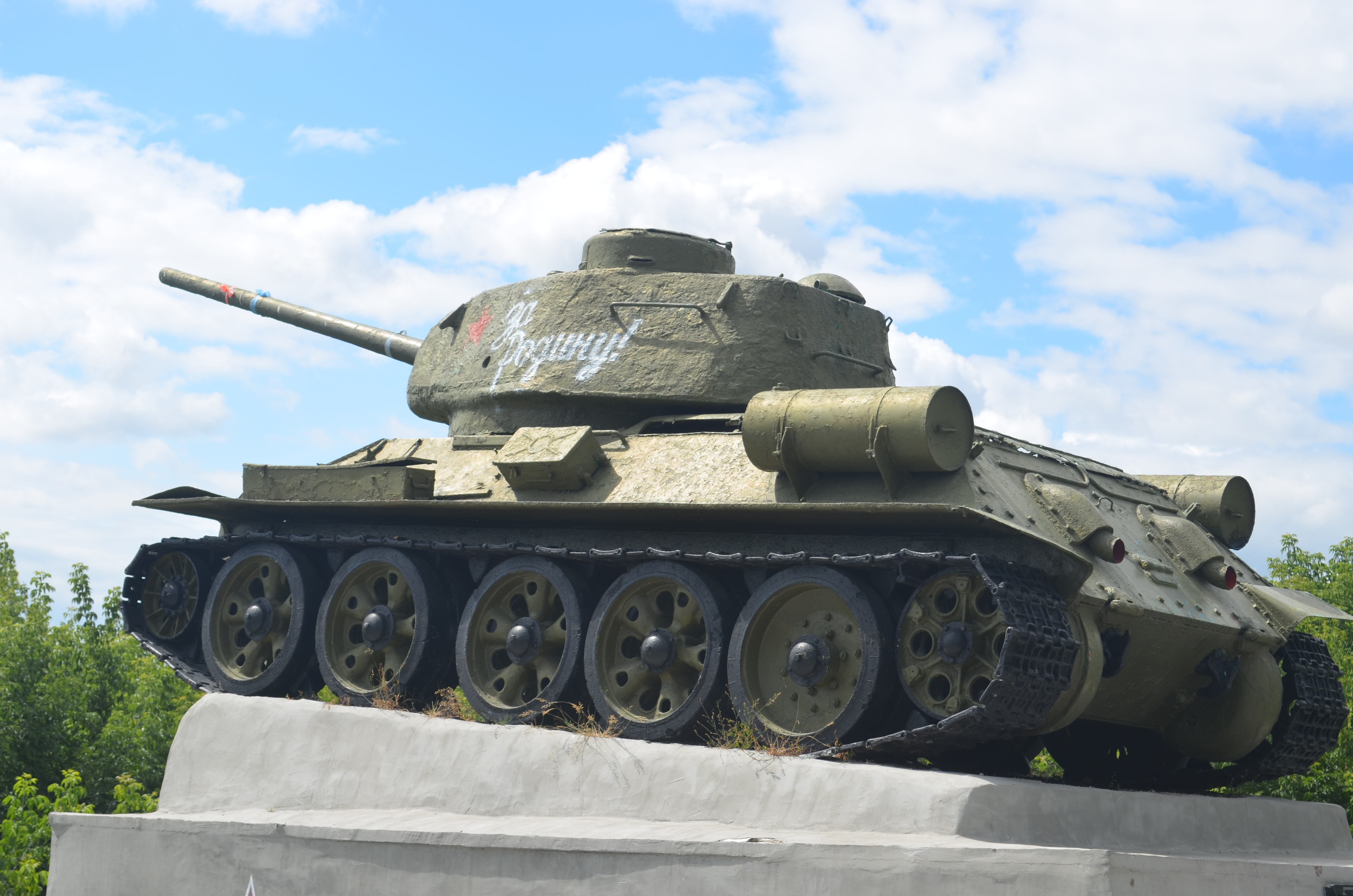 Танк Т-34 в г. Михайлов (Рязанская область)